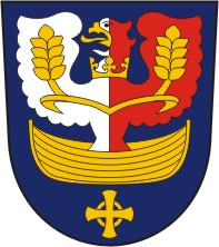 Mšecké Žehrovice